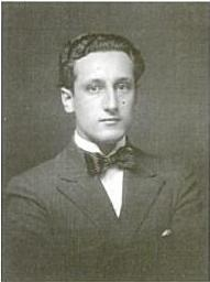 El arquitecto argentino Fermín Bereterbide, en 1930.